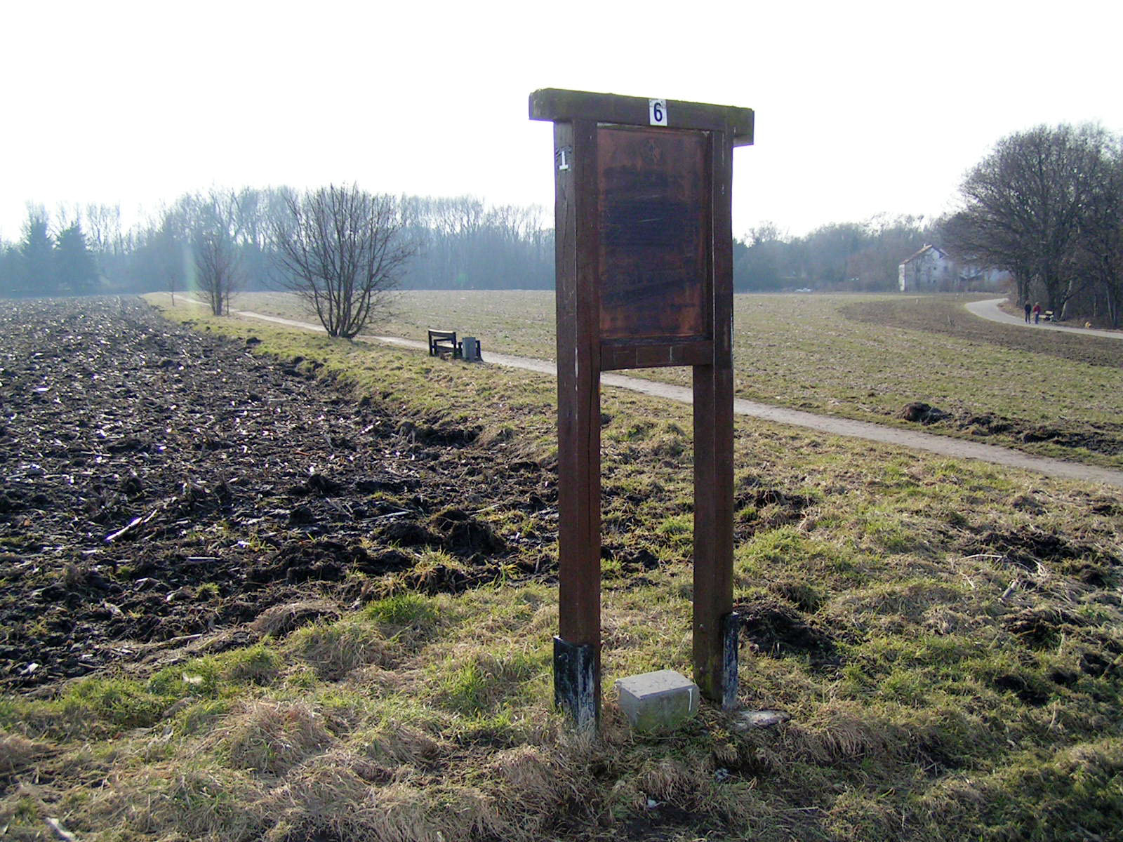 Bergbauwanderweg Wattenscheid bei Eppendorf Historic walking route of early mining in Bochum Wattenscheid, nearby Eppendorf Date: March 2006, Bochum, Germany Author: Maschinenjunge Licence: cc-by-sa-2.5 Wattenscheid